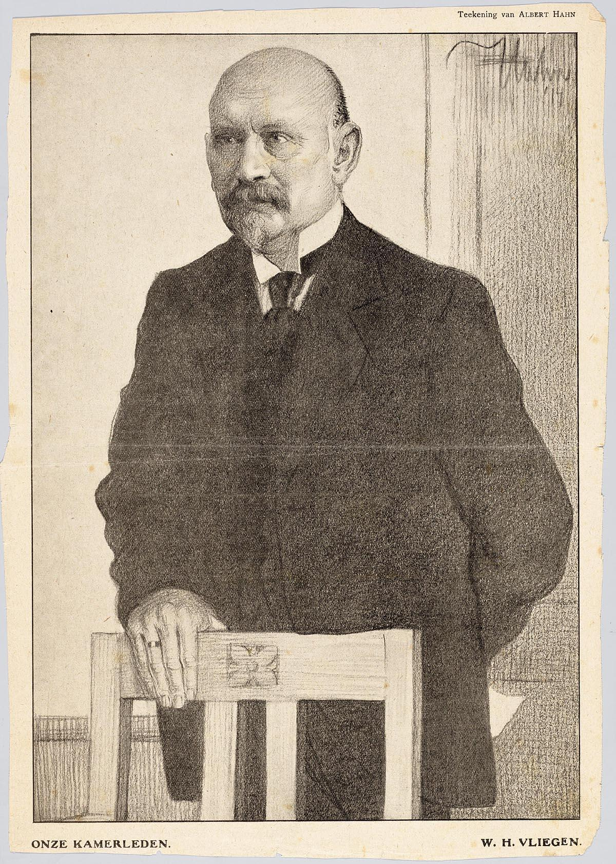 Willem Vliegen.